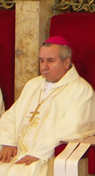 Gerard Bernacki (ur. 3 listopada 1942 w Książenicach) – doktor teologii życia wewnętrznego, biskup tytularny Sala Consillina.